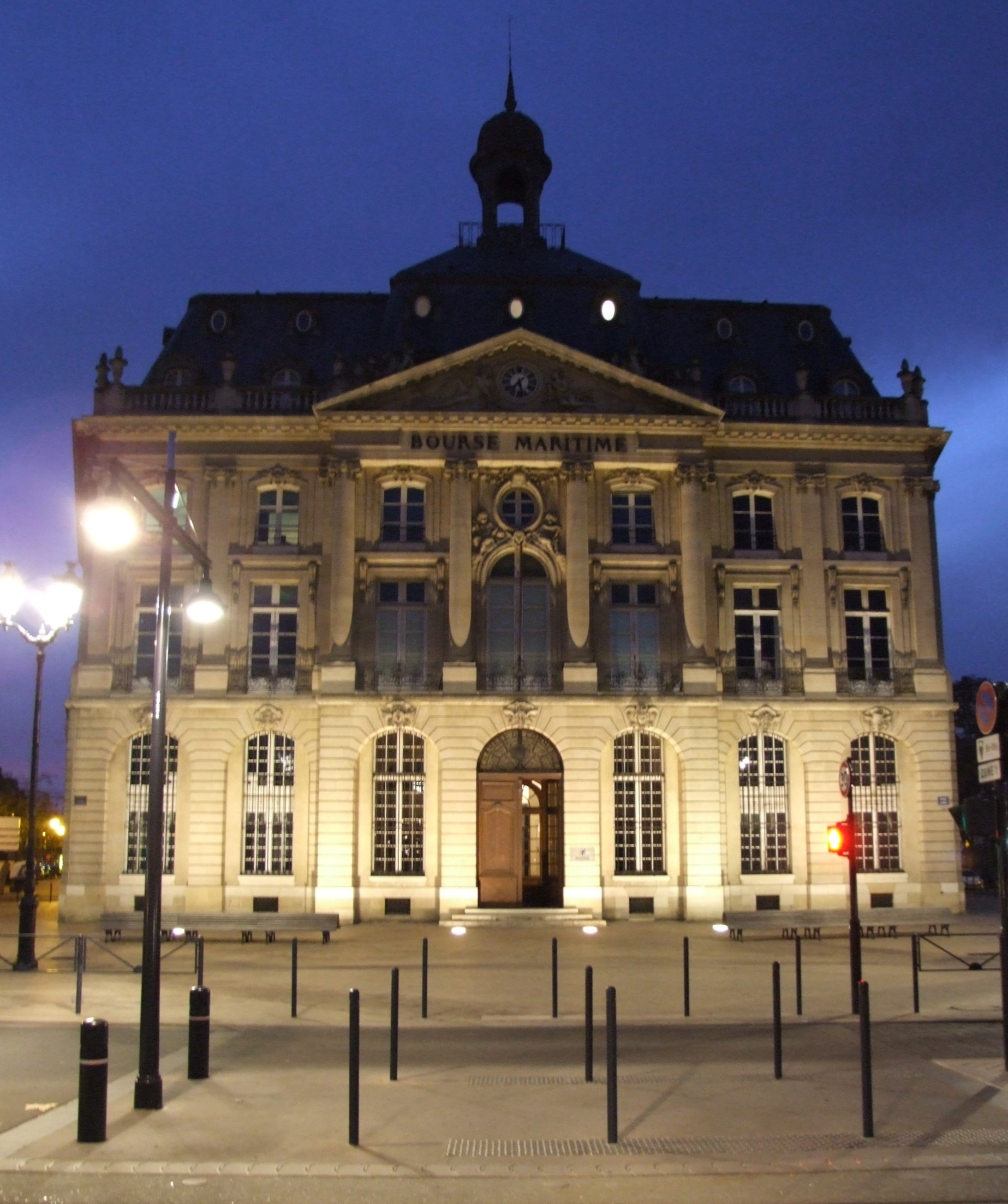 Bordeaux, Gironde, FRANCE